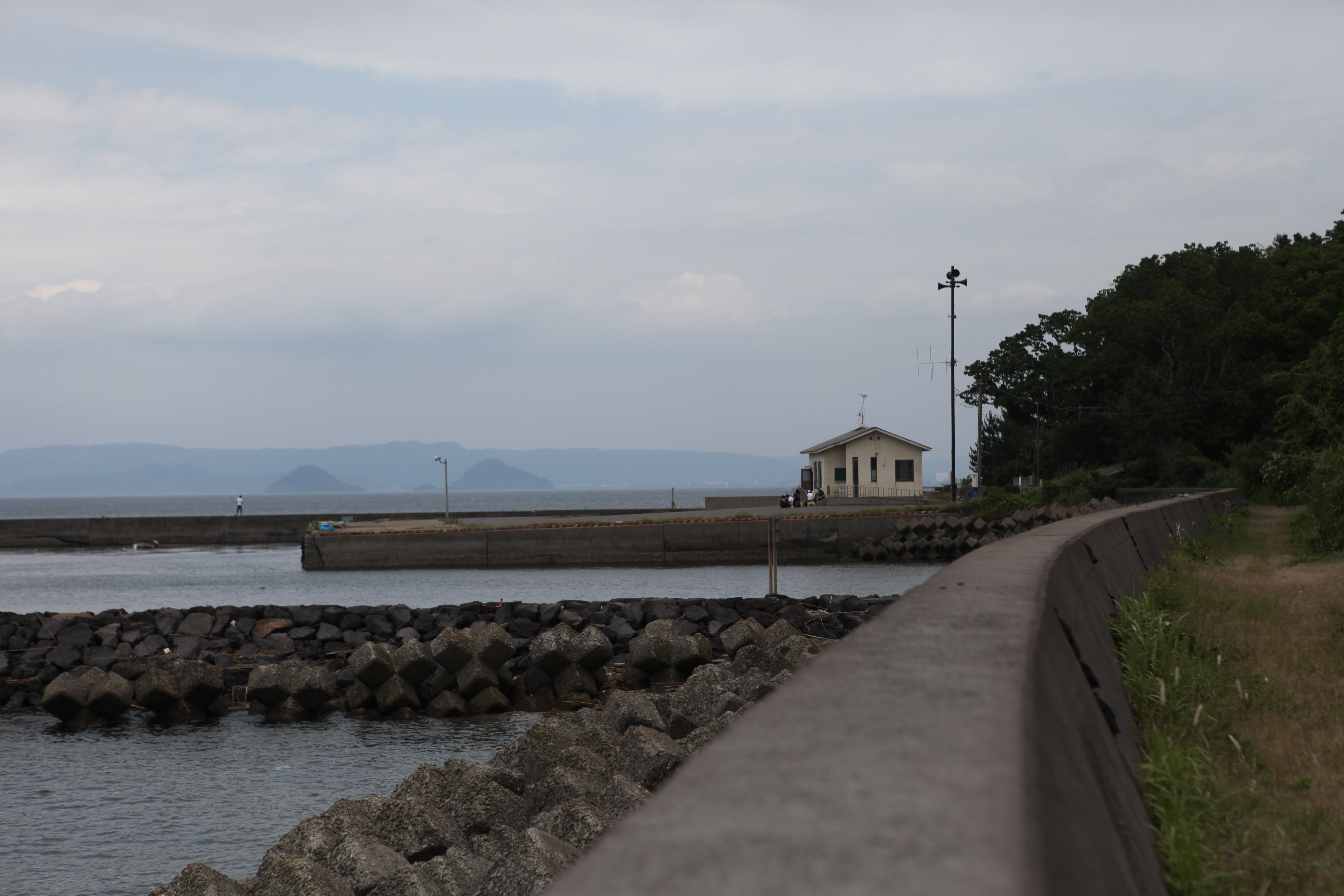 新島の新島港を俯瞰する。